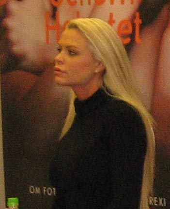 Linda Rosing (1974-), svensk dokusåpadeltagare, fotomodell, sångerska, författare och partiledare. Foto taget 060924 på Bok- och biblioteksmässan i Göteborg av Hedning / Hedning 28 september 2006 kl. 22.02 (CEST)